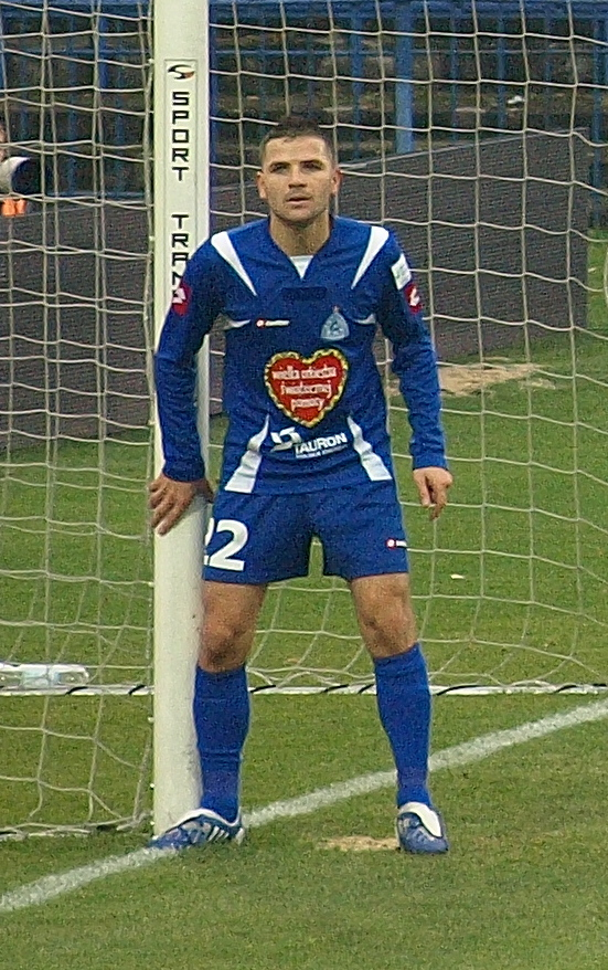 Tomasz Brzyski, piłkarz Ruchu Chorzów.